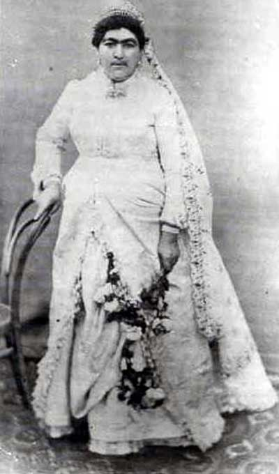 Aniso Doleh, wife of Nasser al-Din Shah Qajar انيس الدوله ٬ سوگلي ناصرالدين شاه